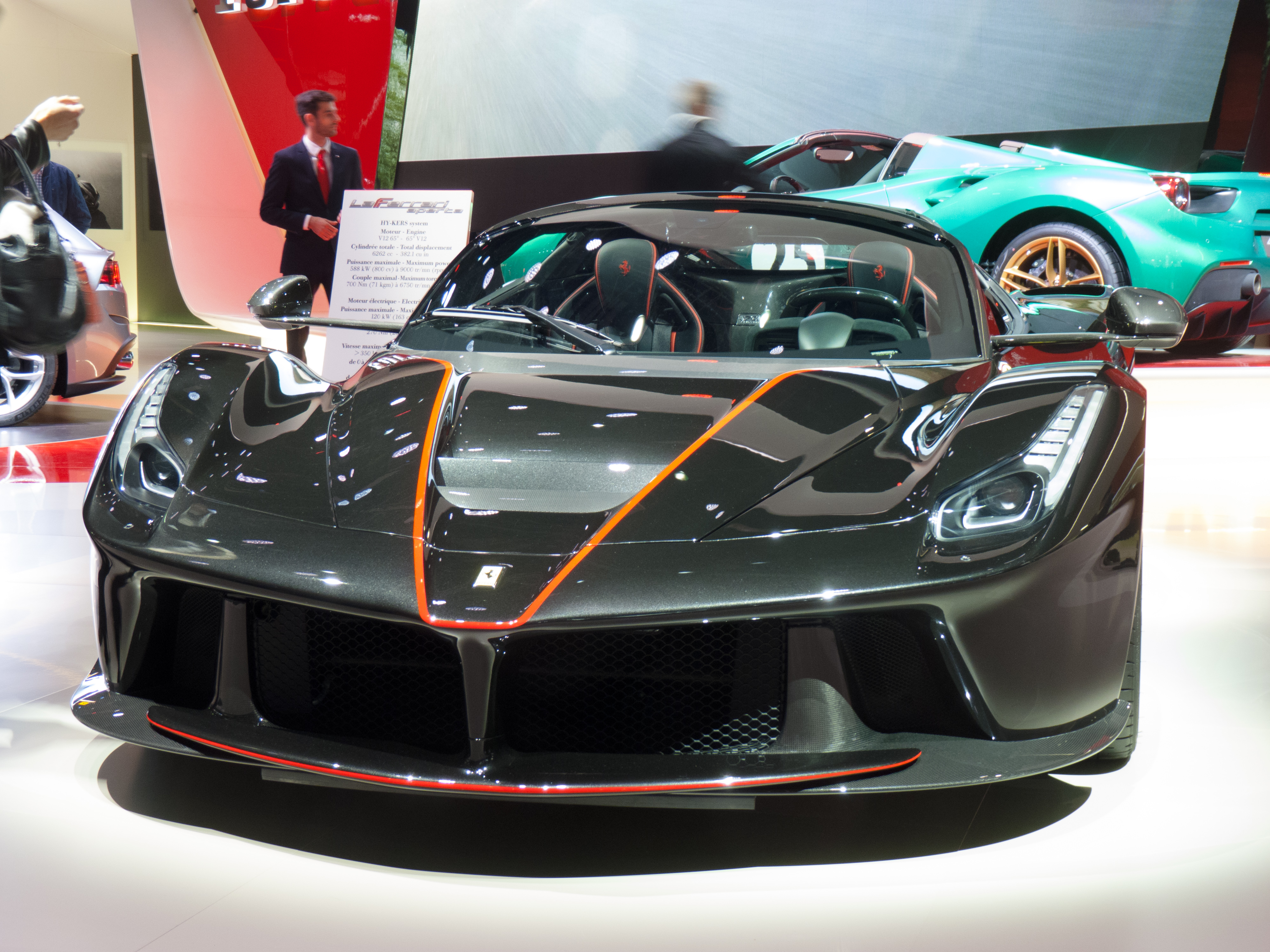 Ferrari LaFerrari Aperta au Mondial de l'automobile de Paris 2016